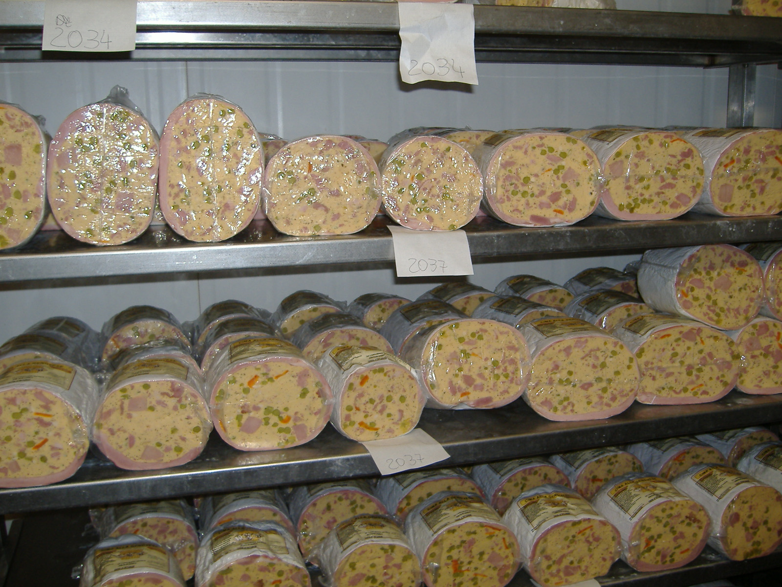 Un prelibatissimo piatto tipico genovese, pronto per essere venduto nella GDO.